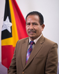 Domingos Carvalho de Araujo, Abgeordneter des Nationalparlaments Osttimros